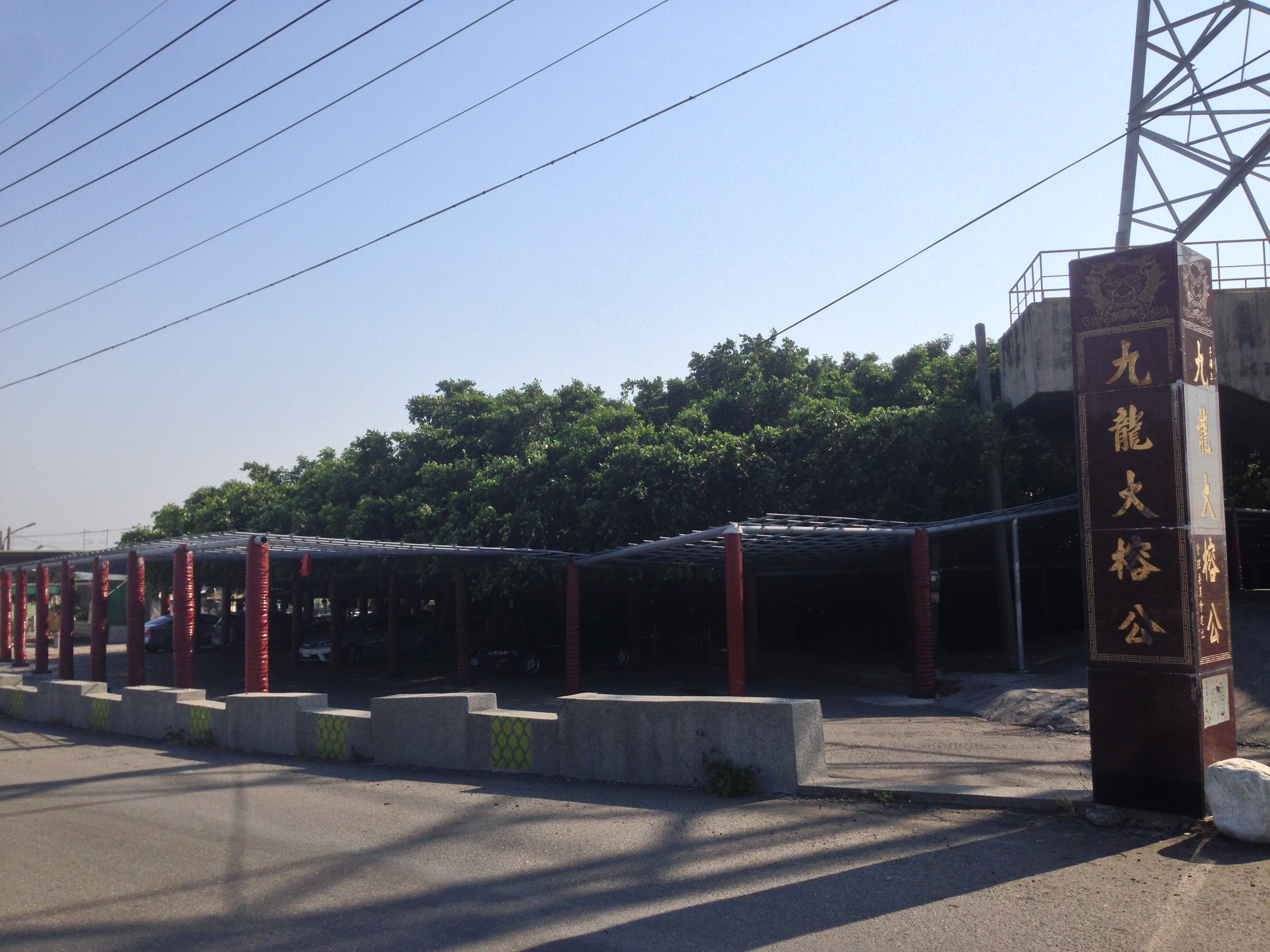 九龍大榕公外景